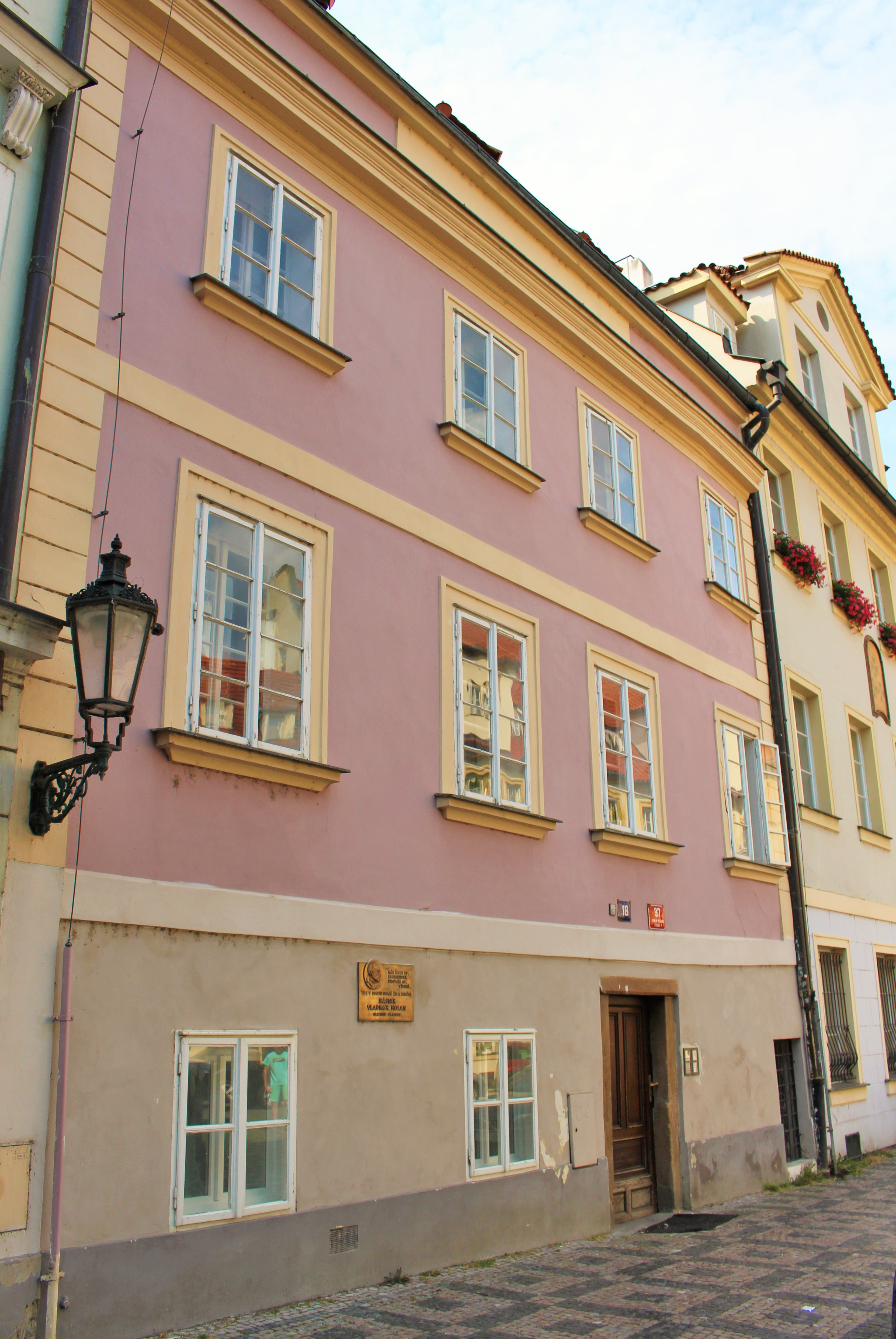 Dům U Krucifixu (čp. 97) na Malé Straně.